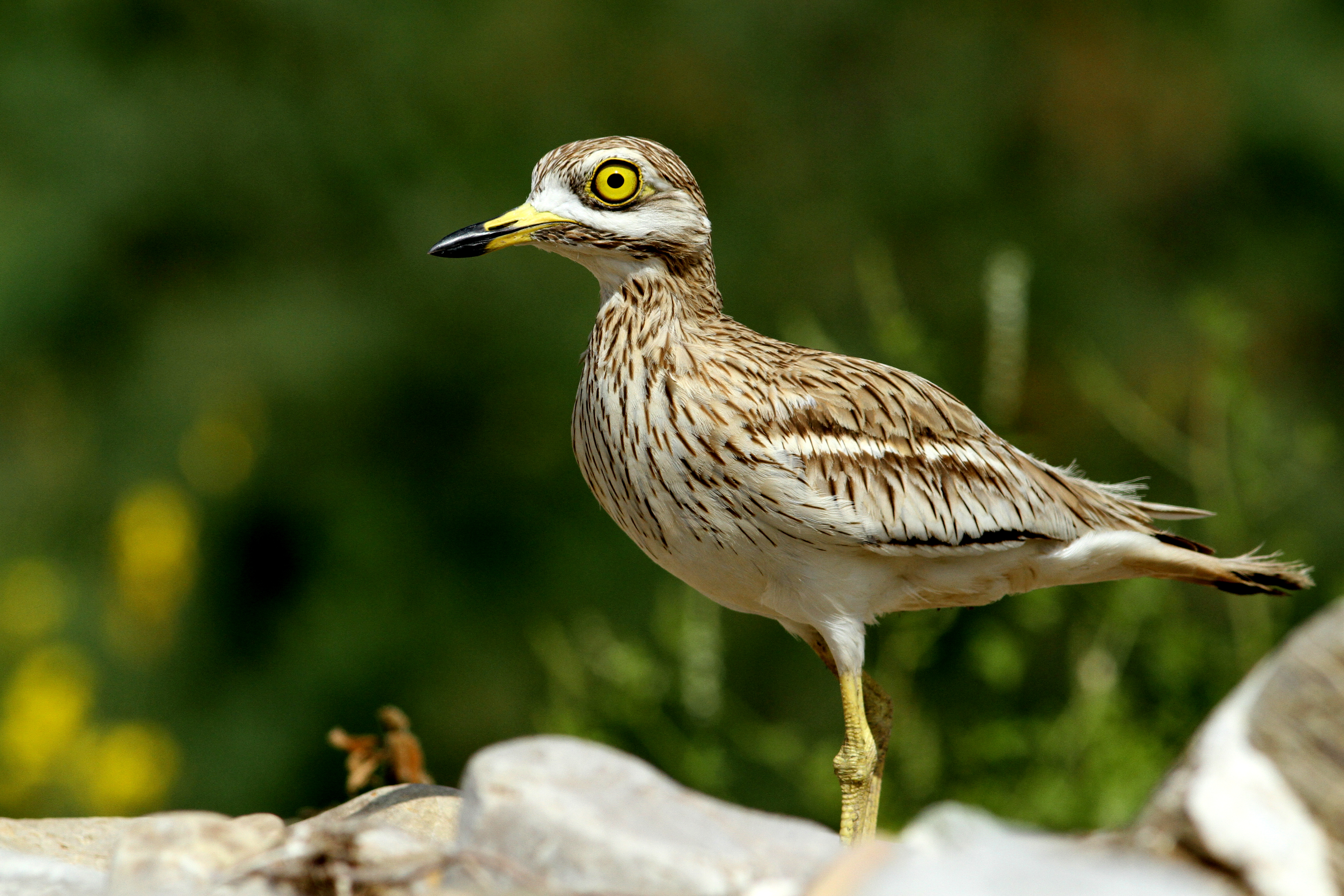 Occhione lungo il greto di un fiume